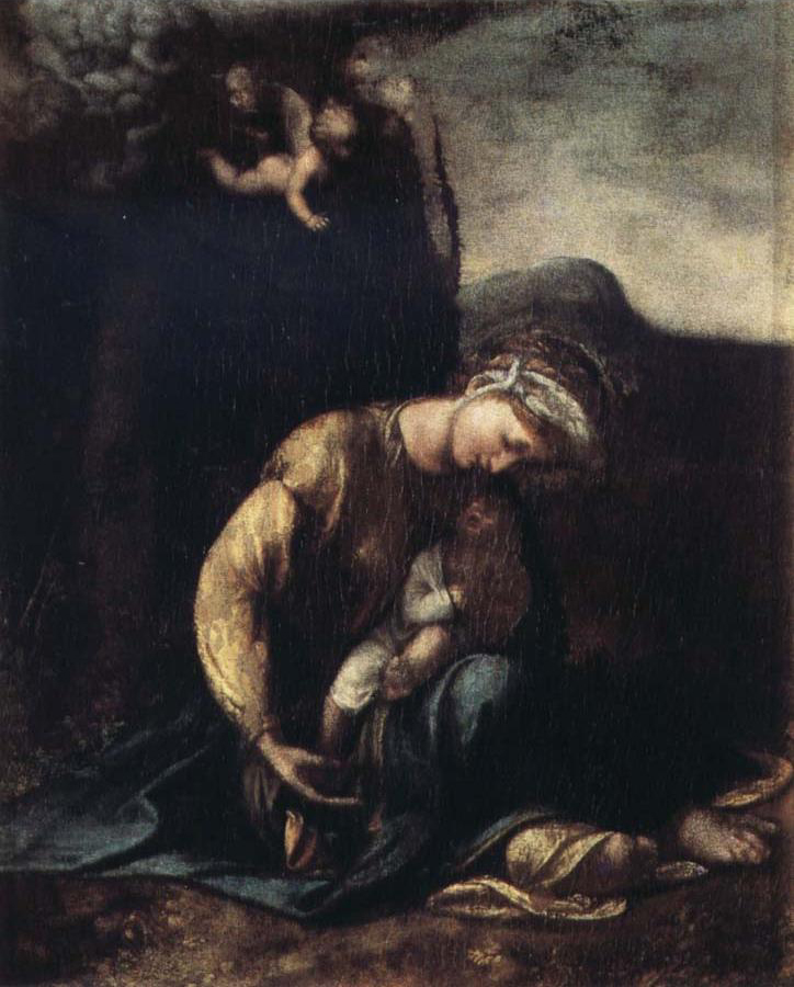 La Madonna col Bambino, detta "Zingarella" di Correggio è un quadro (olio su tavola, cm 46,5 x 37,5) che si trova a Napoli nel Museo di Capodimonte (inv. Q 107), facente parte della Collezione Farnese.